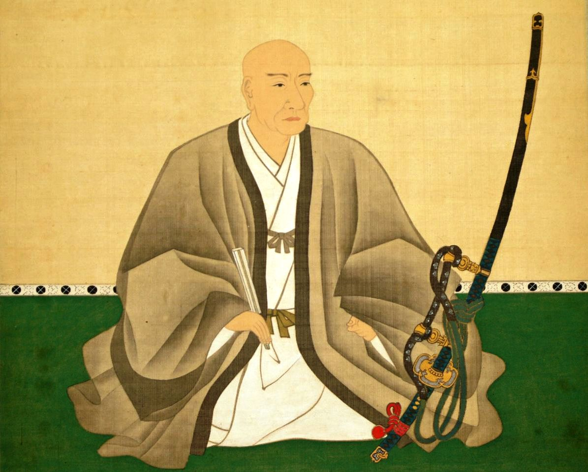 山名豊国（禅高）肖像